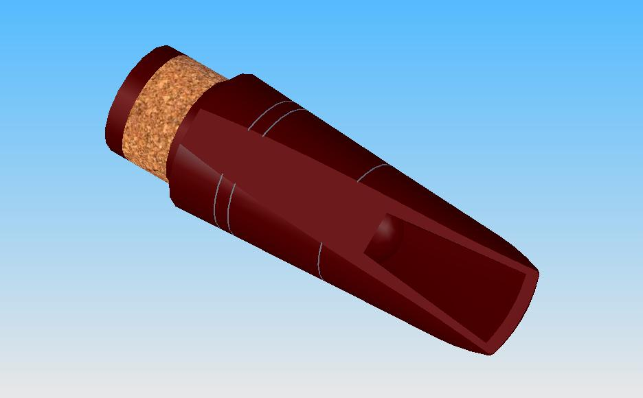 image de synthèse représentant un bec de clarinette réalisée à l'aide d'un logiciel CAO